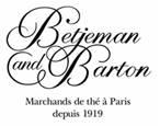 Logo de la marque Betjeman And Barton